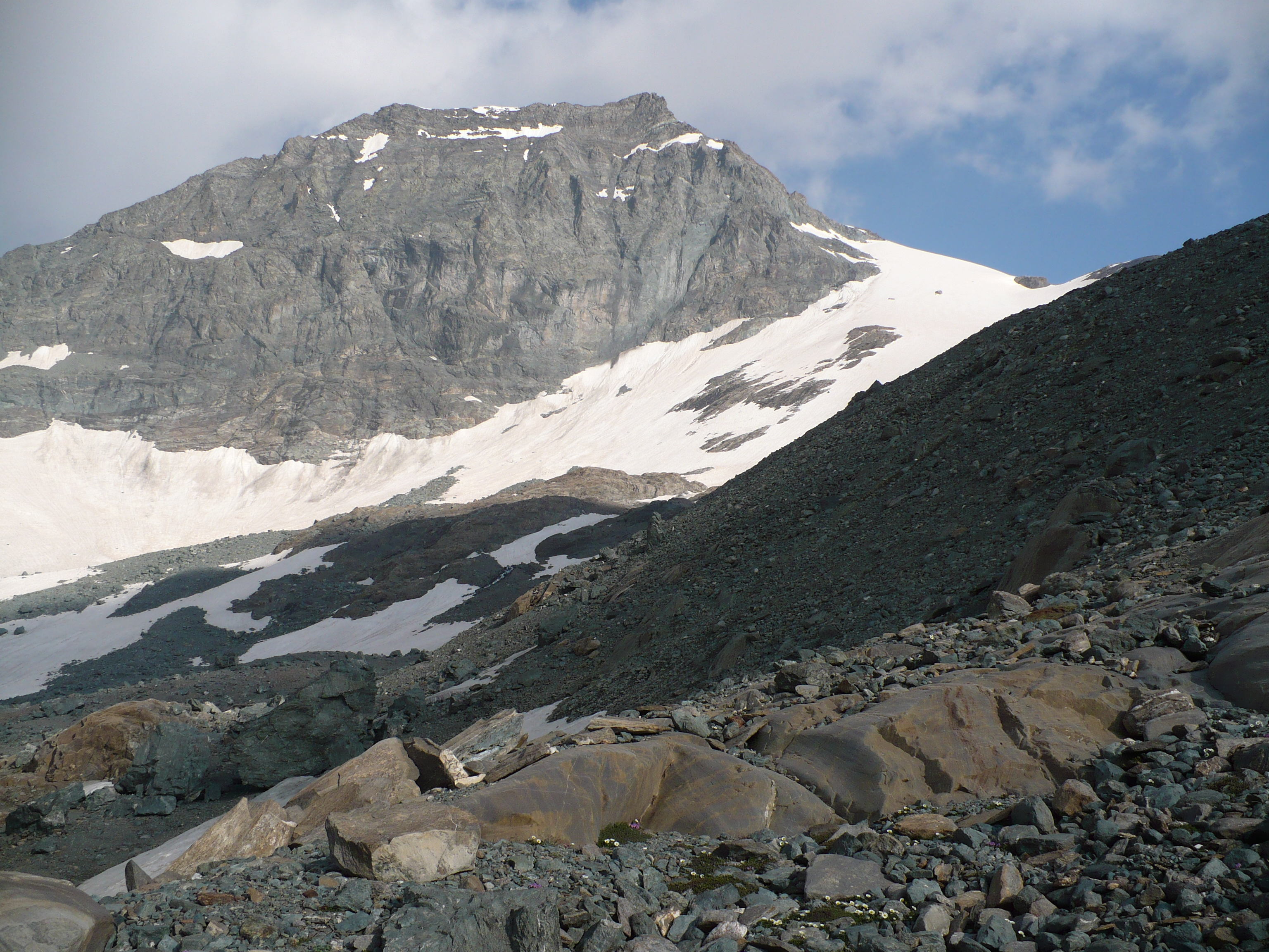 Monte Collerin - Alpi Graie - al confine tra Italia e Francia